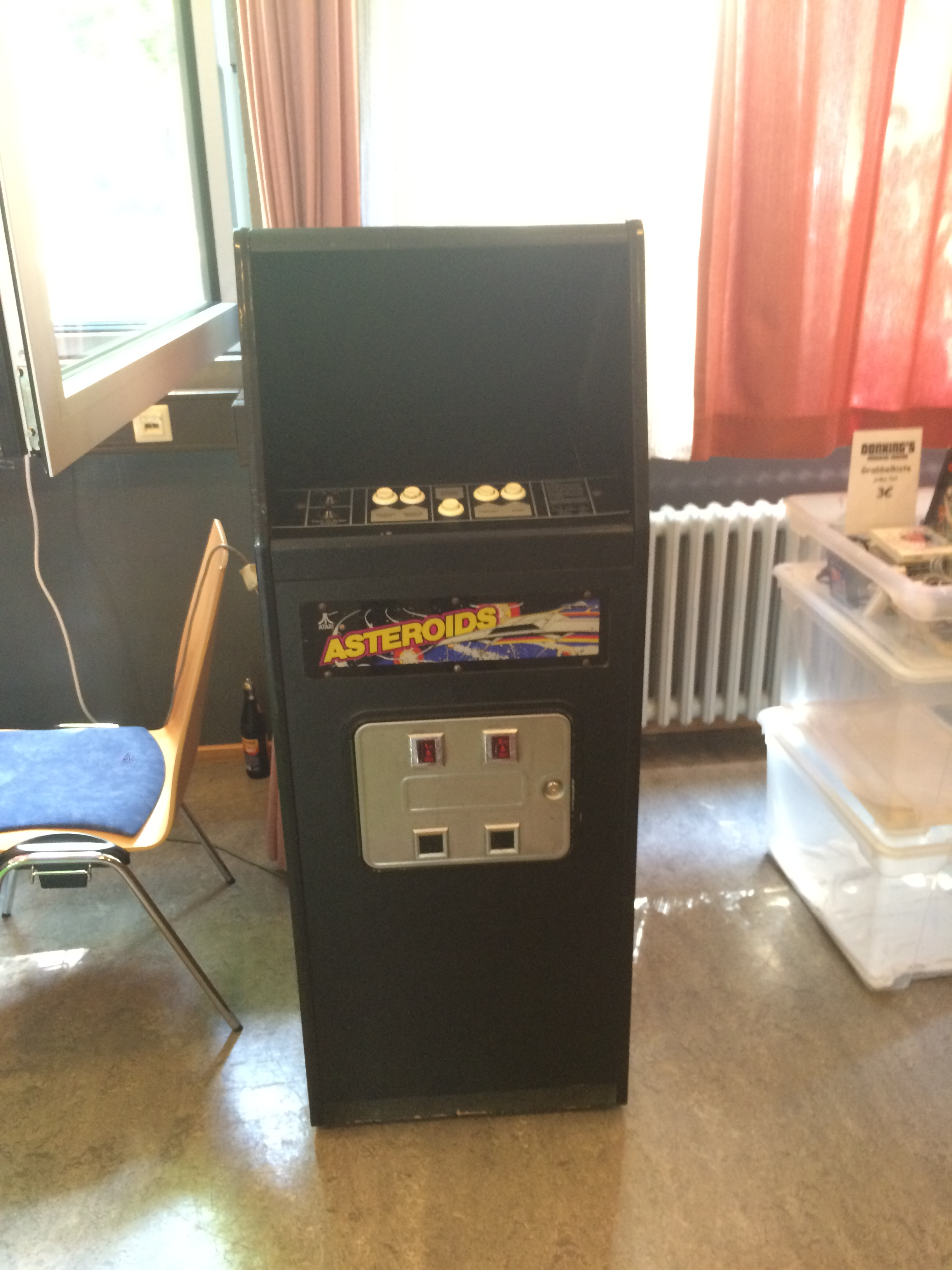 Asteriods Carbinet